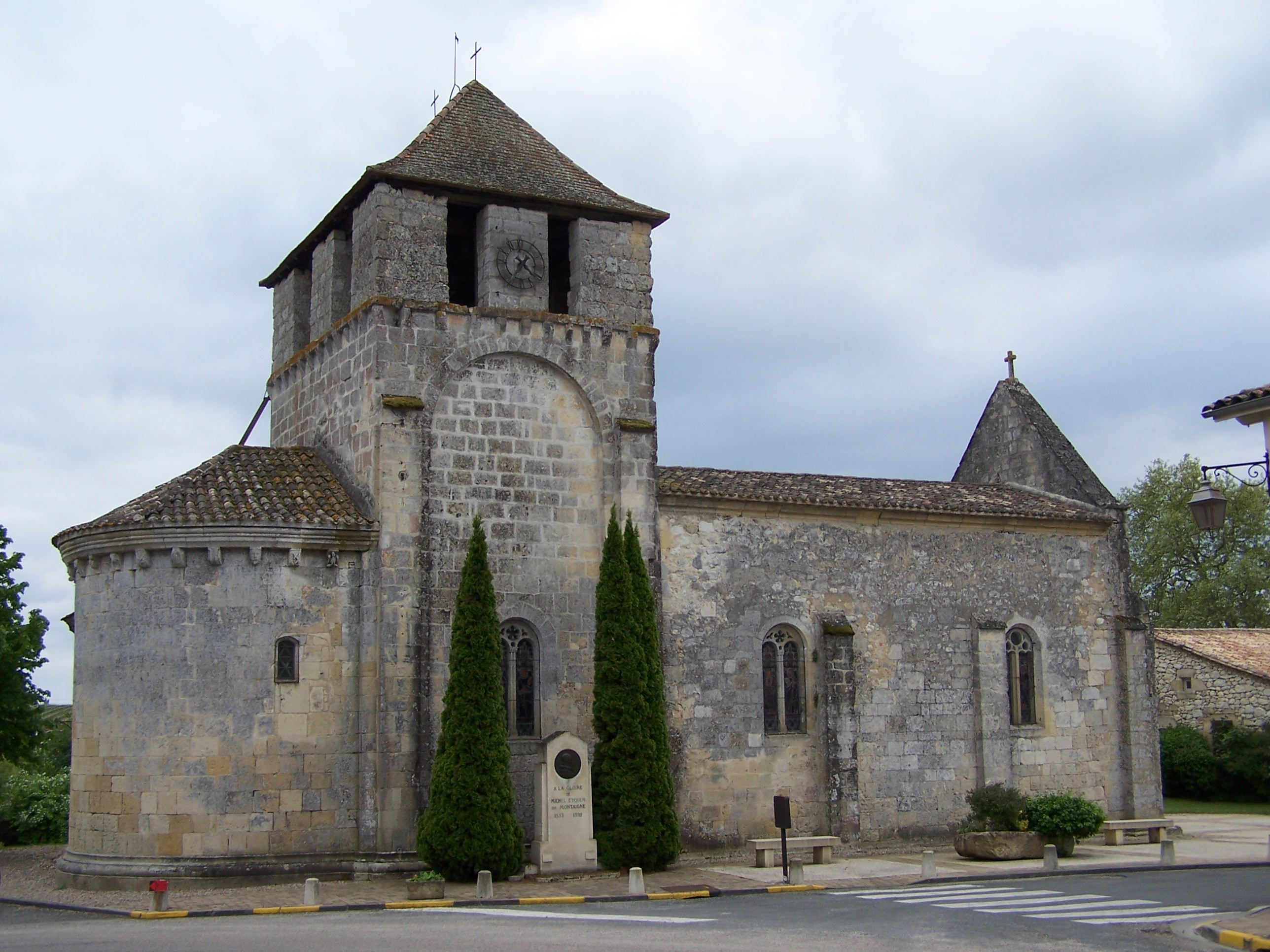 Église de Saint-Michel-de-Montaigne, Dordogne, France